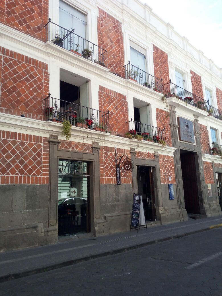 Fachada de la Casa del Mendrugo